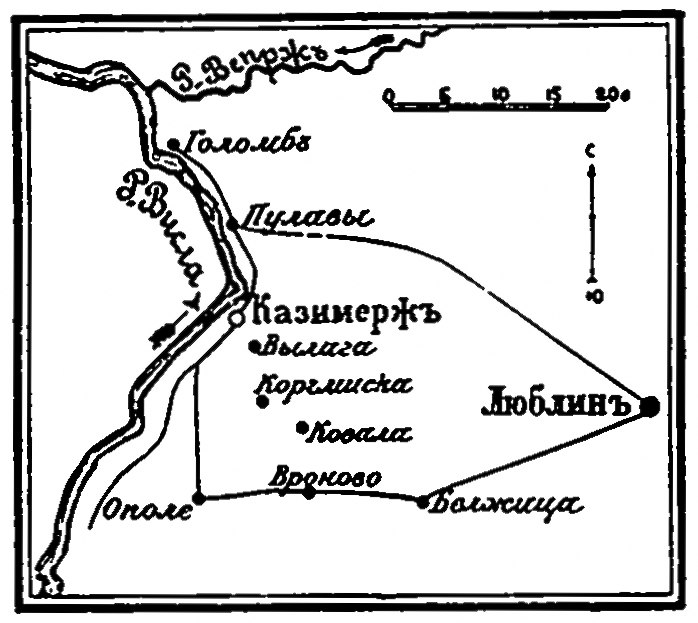 Это изображение было использовано для иллюстрирования статьи «Казимерж» опубликованной в одиннадцатом томе «Военной энциклопедии», который был издан книгоиздательским товариществом И. Д. Сытина в 1913 году в столице Российской империи городе Санкт-Петербурге.